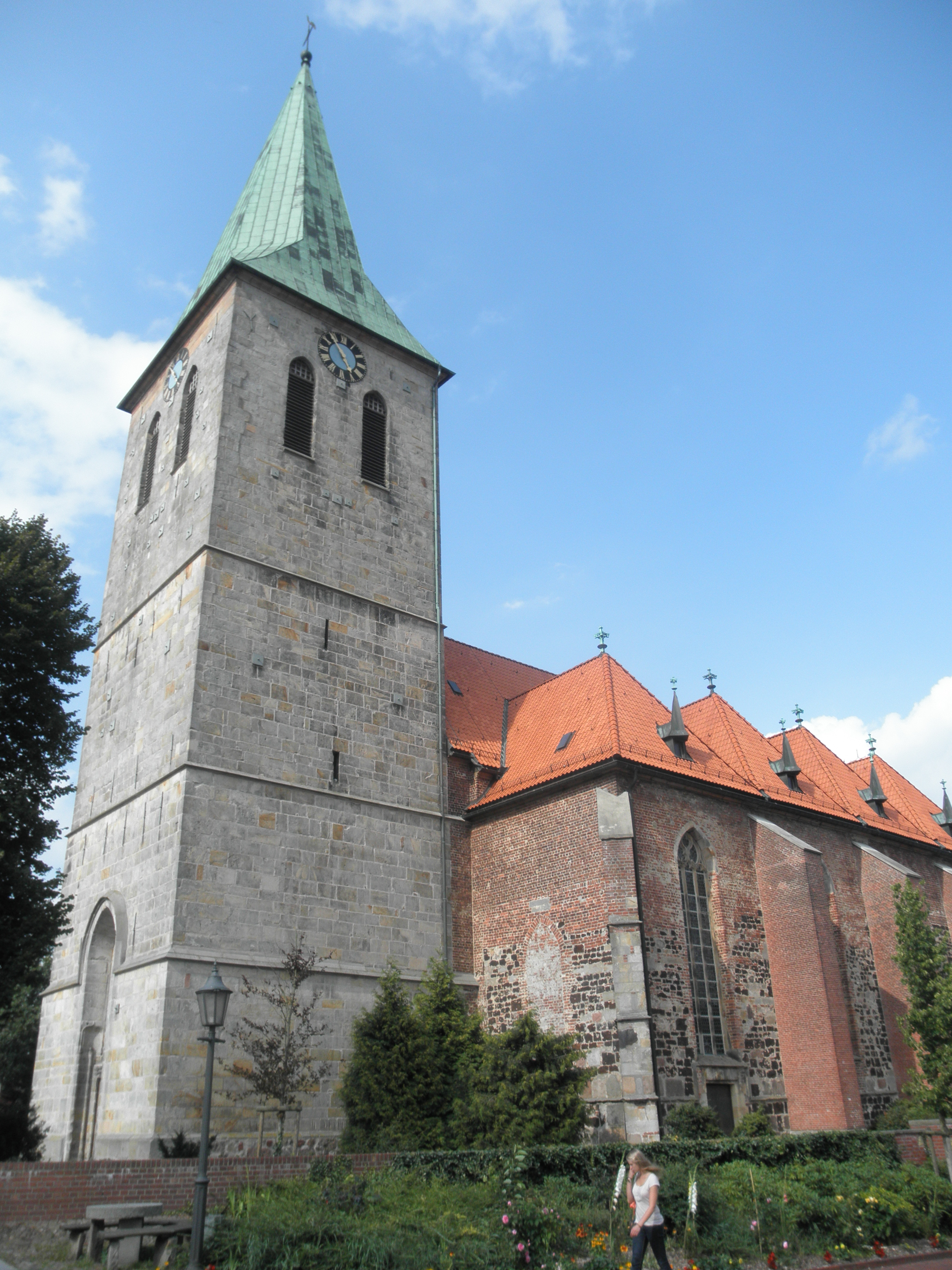 Preĝejo St. Vincentius Haselünne, Germanio